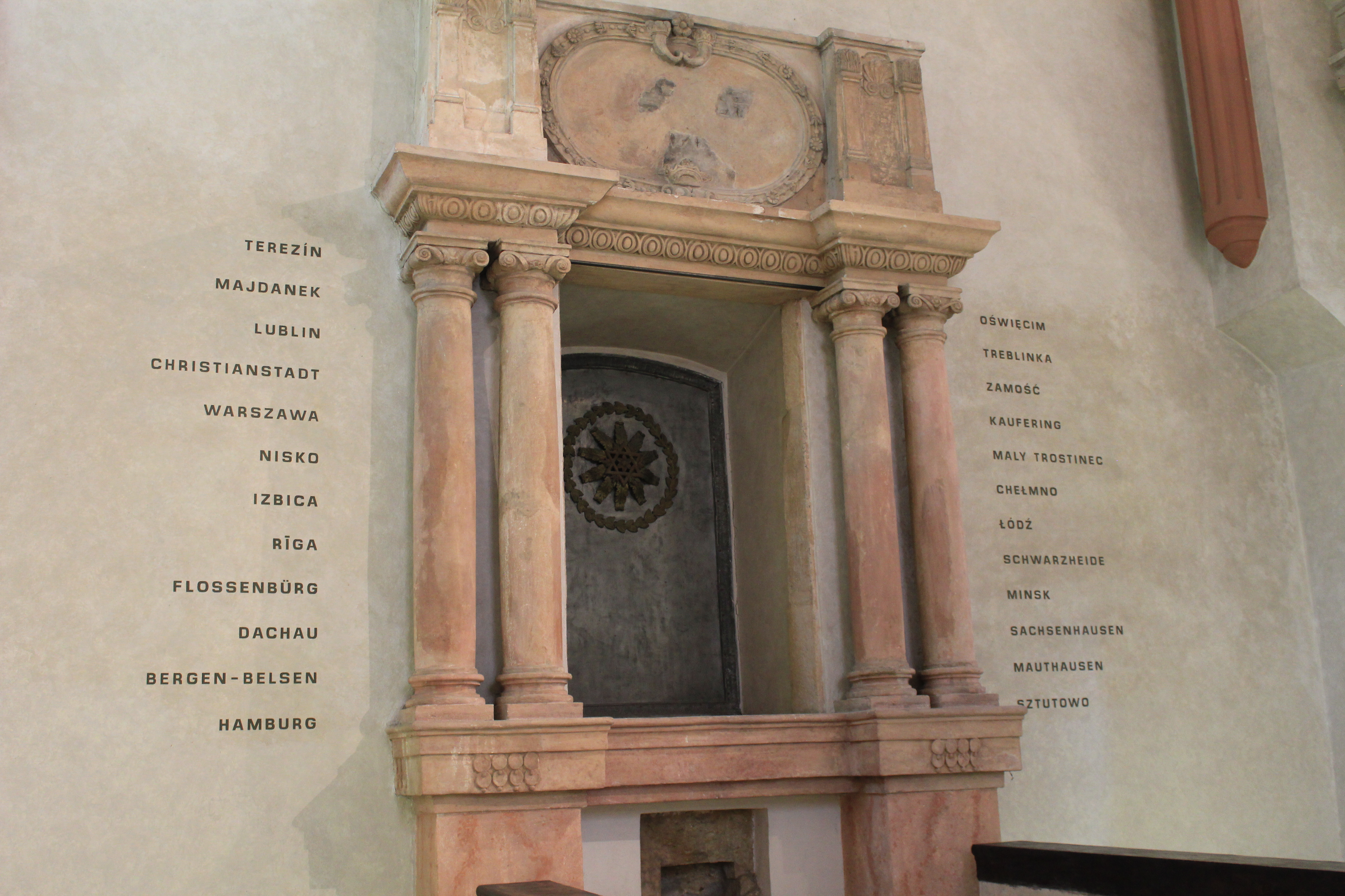 Navn på utryddelsesleire i pinkas-synagogen